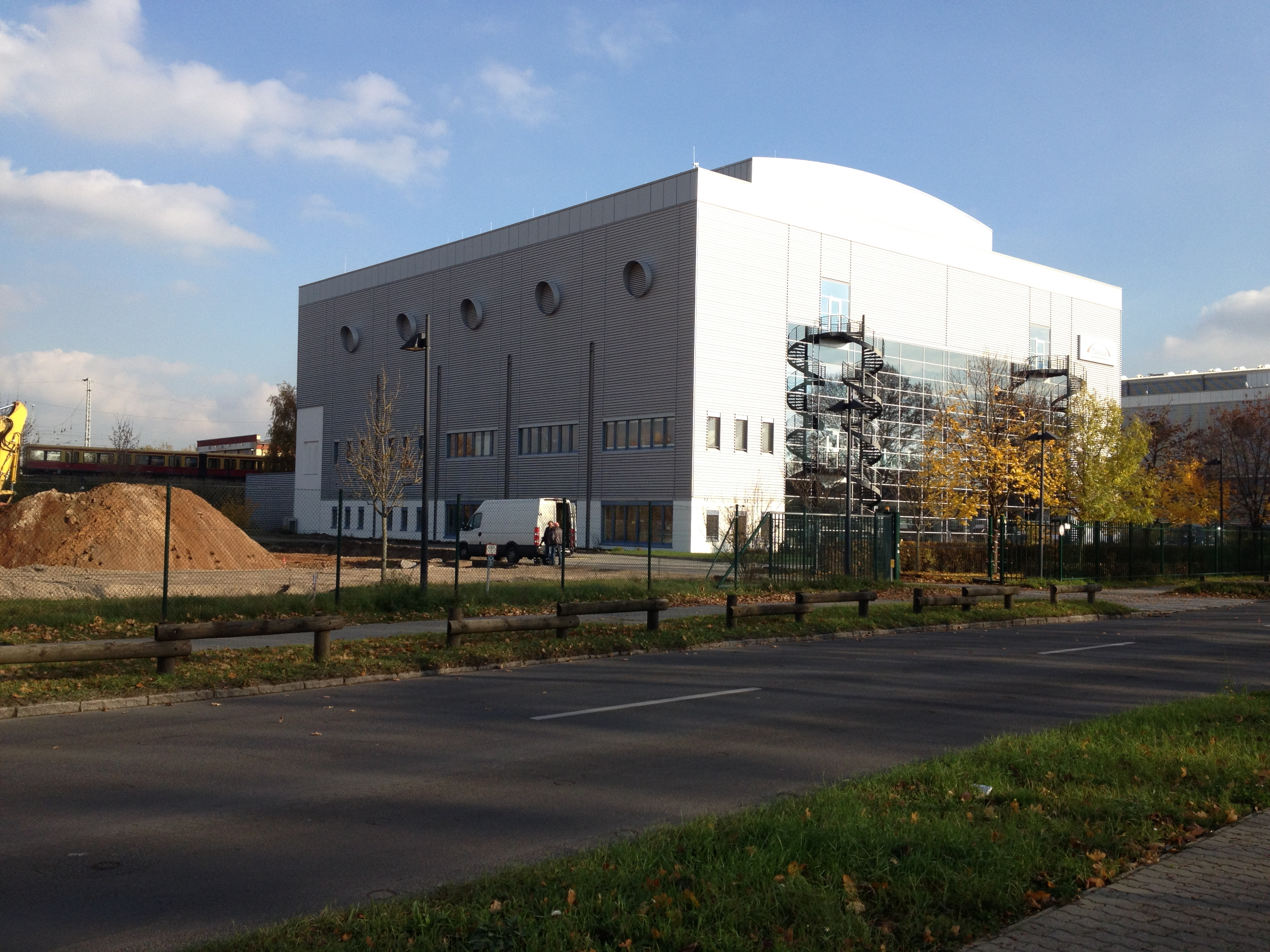 Takeda-Hallen im Industriegebiet von Oranienburg